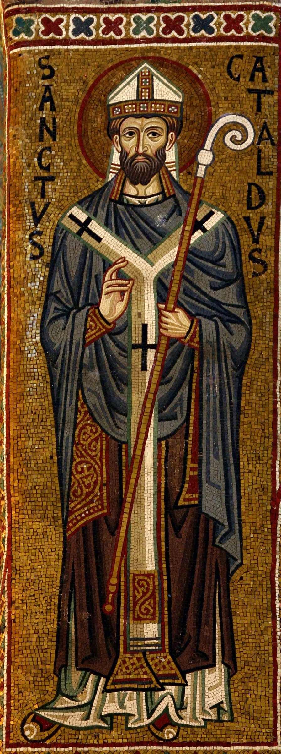 Capela Palatina